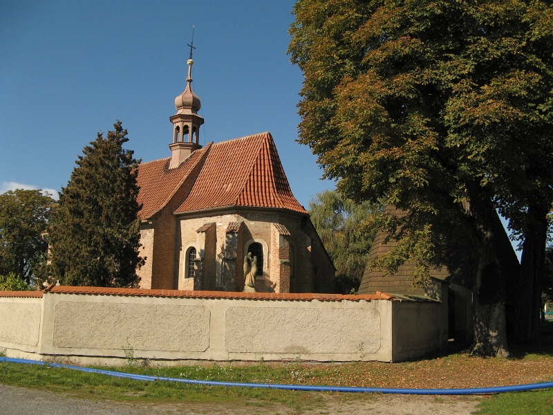 Kostel Narození P. Marie (Jabkenice), J část návsi, Jabkenice